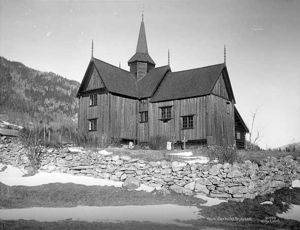 Nore stavkyrkje